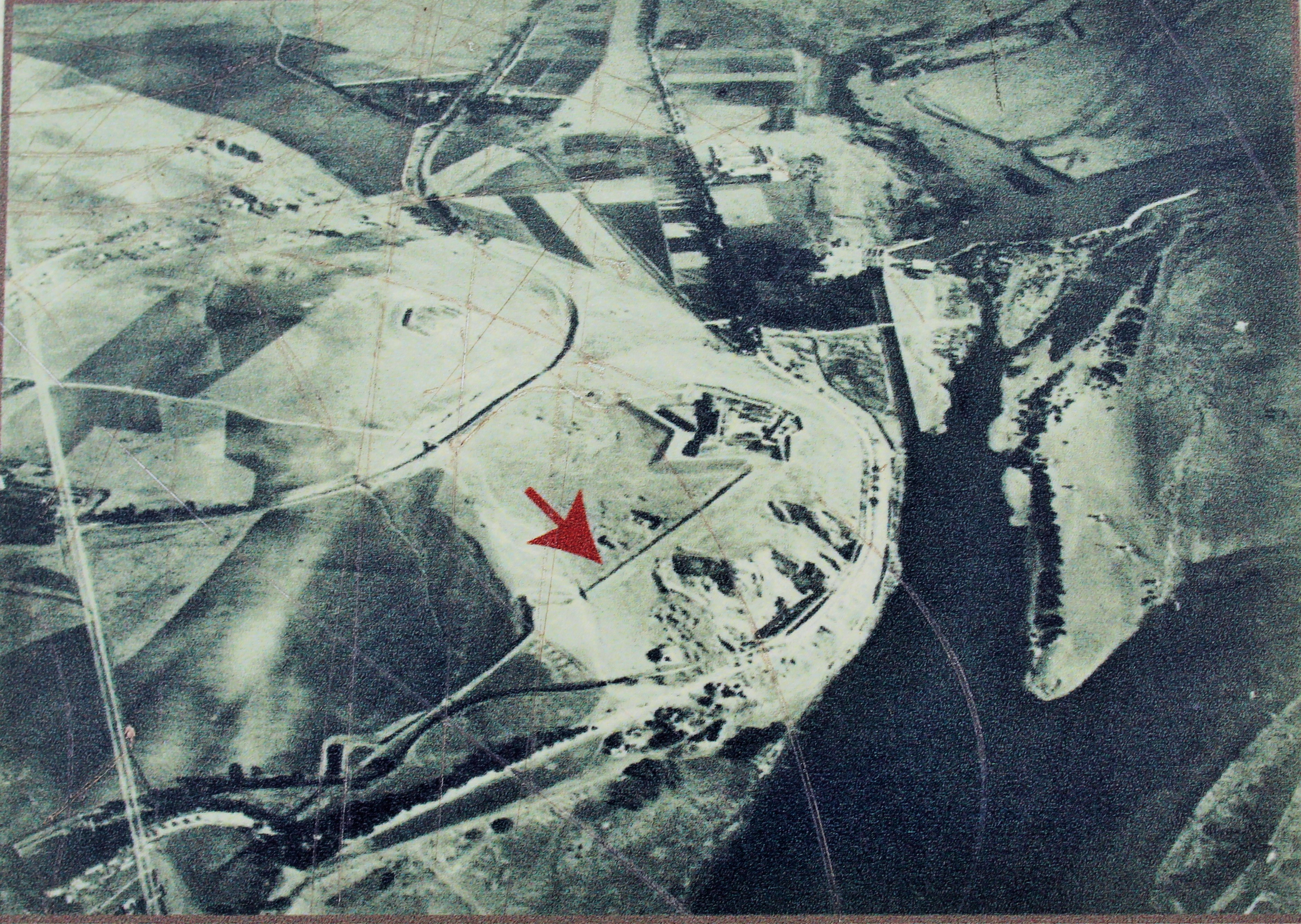 Vista aerea de 1914 del camino cubierto desde hornabeque al Fuerte de San Cristobal.